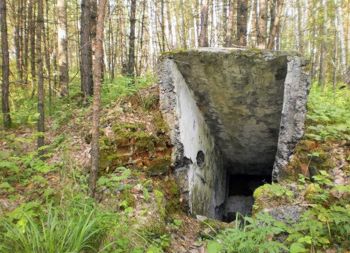 Вход в бункер, в посёлке Акуля